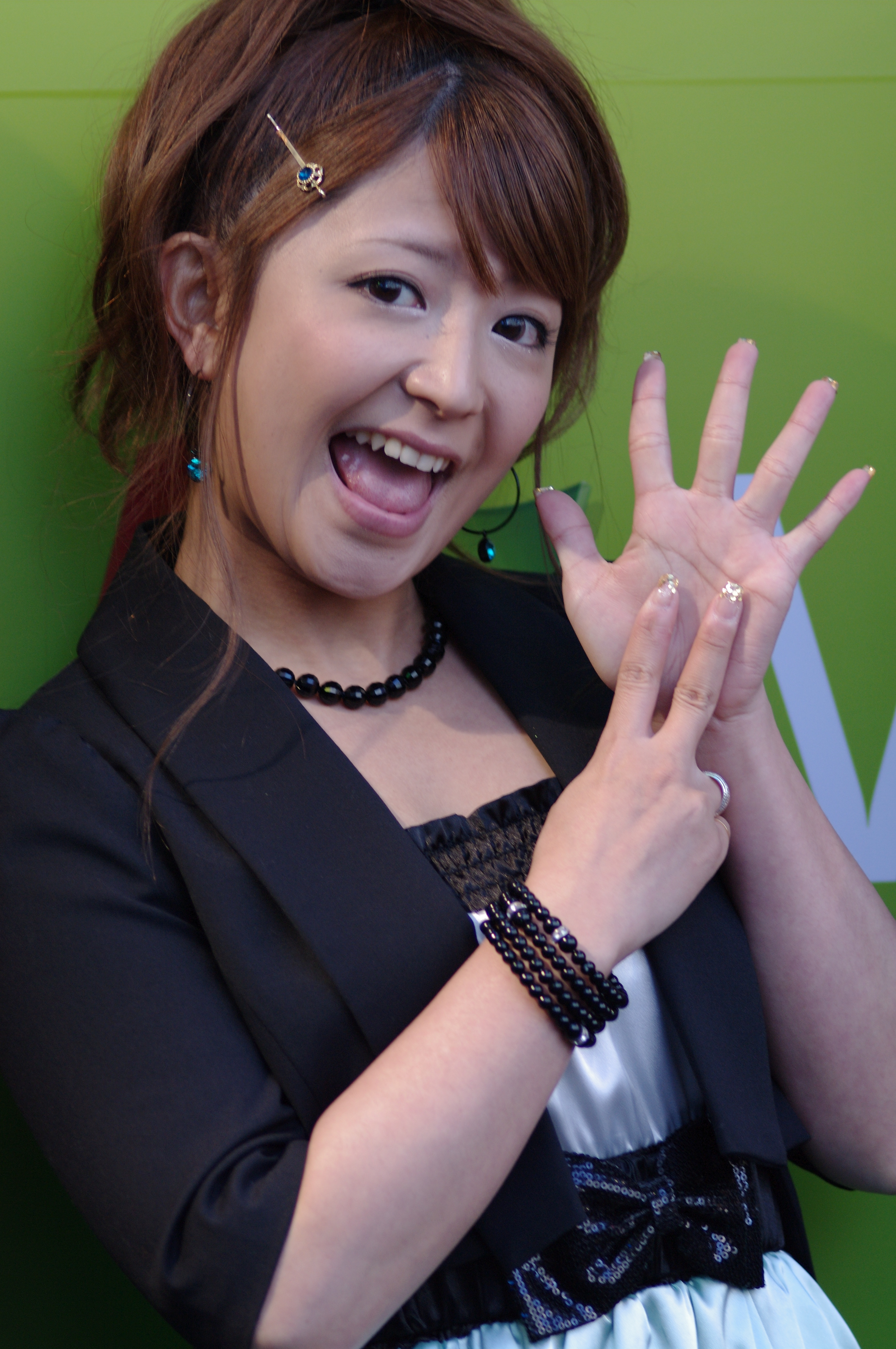 7 by 矢口真理 私の場合、165/2.8のおかげで視線がもらえたのでしょう